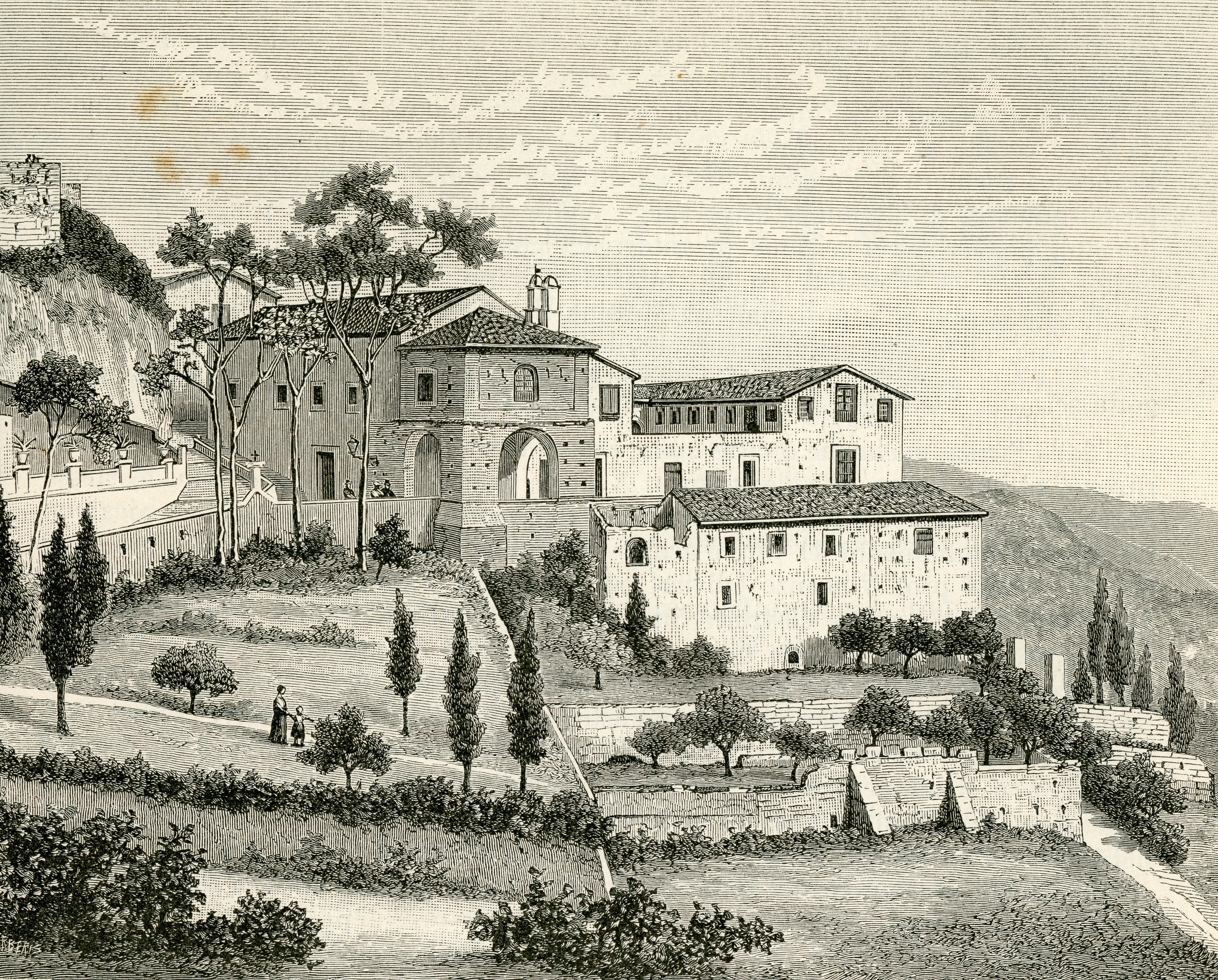 Castroreale: convento dei cappuccini (xilografia di Barberis da schizzo di Mario Casalaina 1892).